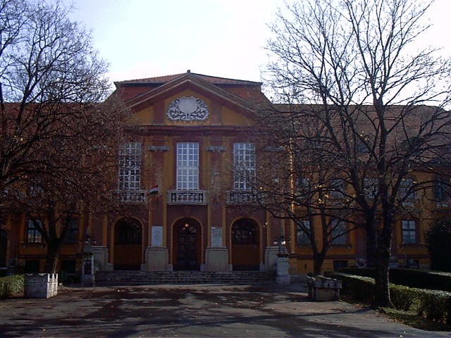 Polgármesteri Hivatal (Komárom)